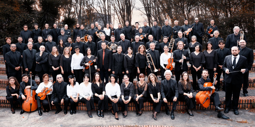 Orquesta Filarmónica de Bogotá Foto: Kike Barona